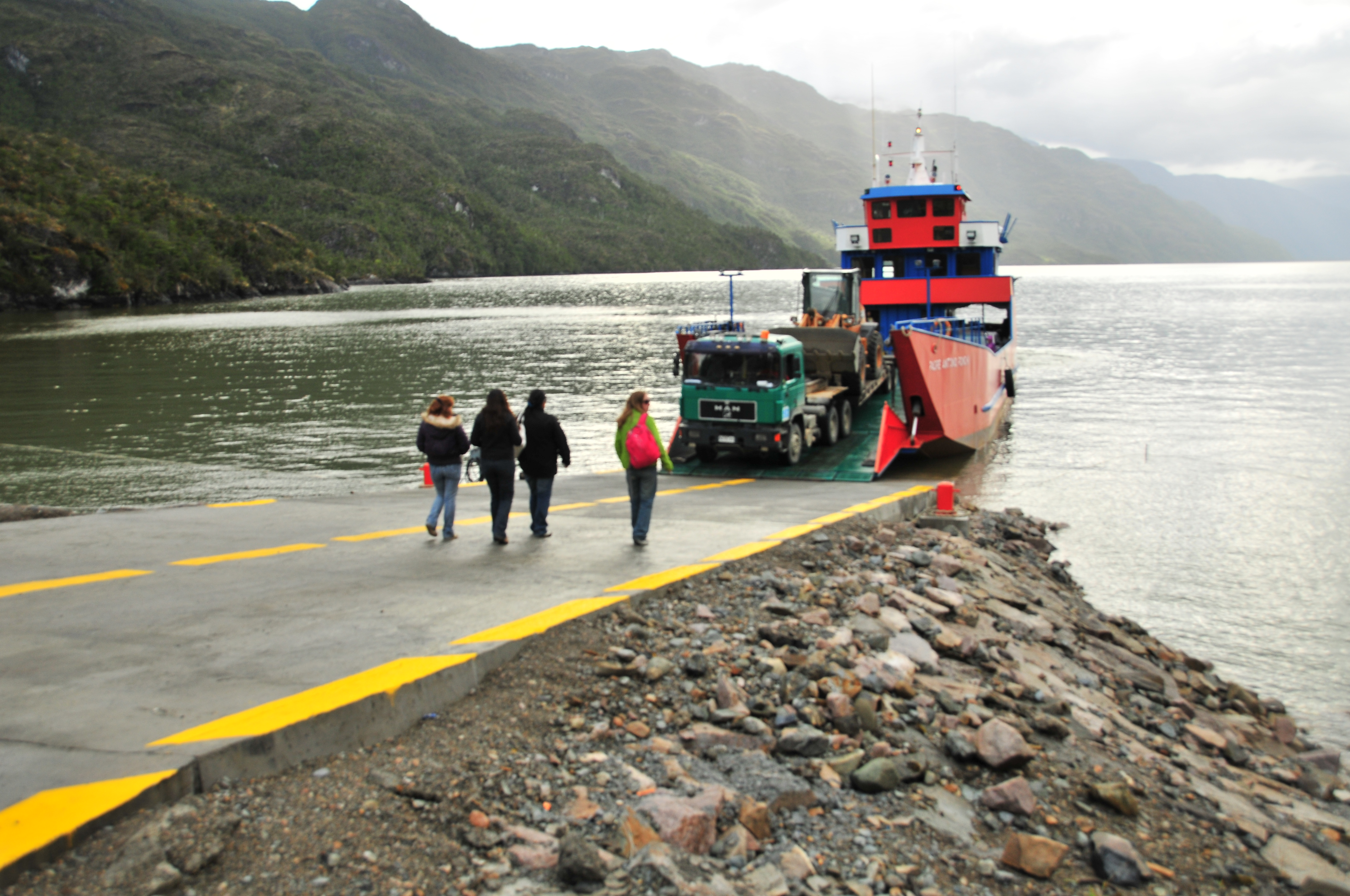 Subida al ferry o transbordador en Puerto Yungay, rumbo a Villa O´higgins.